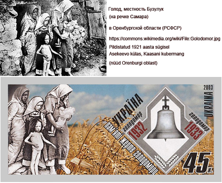 Postmargile Ukraina Golodomor 1932-1933 on disainitud foto 1921 aasta näljahädast Kaasani kubermangus (nüüd Orenburgi oblast,Vene föderatsioon)